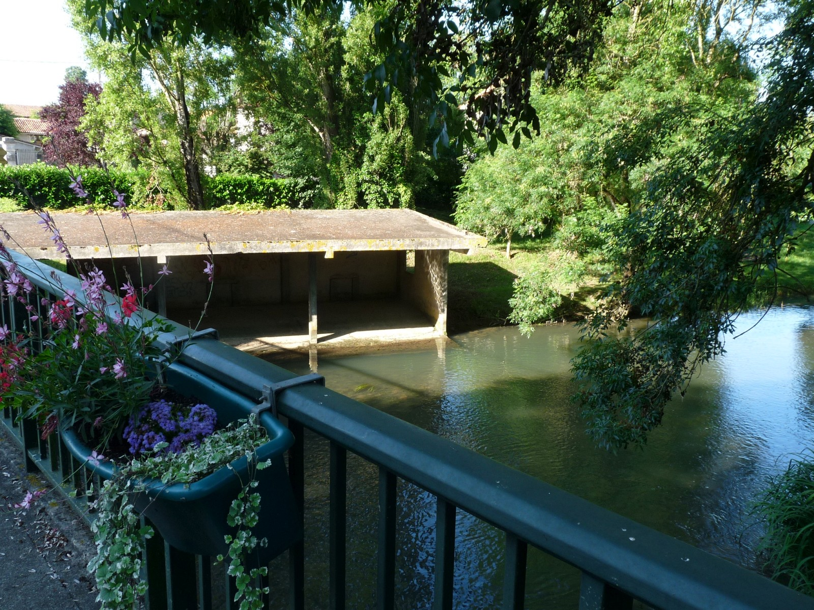 Le Sonsonnette, Valence, Charente, France